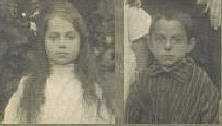 Женя и Валя Чеберяк Zhenyz and Valya Cheberyak